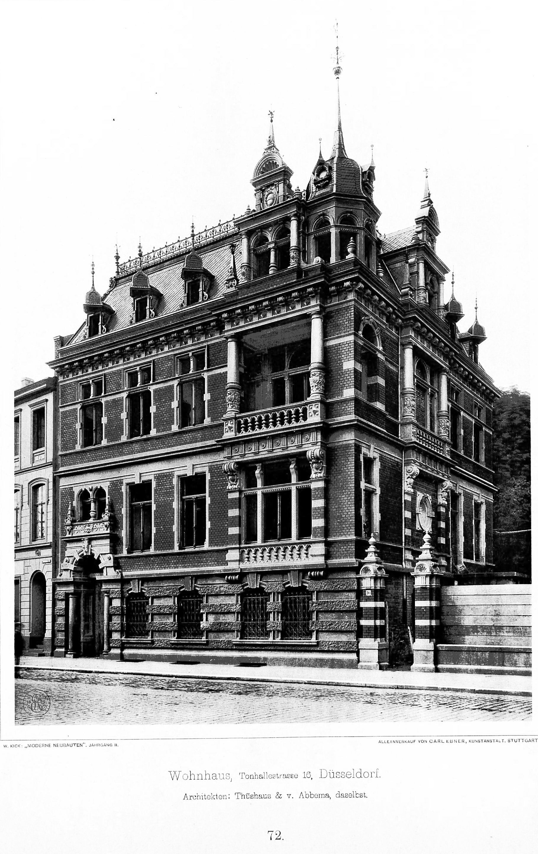 Wohnhaus_Tonhallestrasse_16,_Düsseldorf,_Architekt_Thüshaus_&_v._Abbema,_Düsseldorf,_Tafel_72,_Kick_Jahrgang_II.jpg Bildbeschreibung durch die Wikipedia-Benutzer Benutzer:Markoz und Messina vom 14. Oktober 2010 und vom 25. April 2011: Über einem rustizierten Erdgeschoss erhoben sich die beiden Obergeschosse. Die Fassade zur Straße war in vier Achsen unterteilt, wobei die vom Betrachter aus rechte Eckachse eine besondere Betonung erfuhr. Über Zwillingsfenster im Erdgeschoss erhob sich ein Drillingsfenster im ersten Obergeschoss, das von Pilastern flankiert wurde. Die Pilaster stützten einen Architrav, der mit Triglyphen und Guttae geschmückt war. Über dem Architrav schloss im zweiten Obergeschoss eine Loggia an. Flankiert wurde diese von mit Beschlagwerk geschmückten Säulen, die wiederum einen Architrav trugen. Darauf erhob sich ein mit Säulen, Rollwerk, Voluten und Obelisken geschmückter Zwerchgiebel. Beschlag- und Rollwerk sowie Voluten schmückten das Portal an der linken Seite des Hauses. Die Seitenansicht des Hauses wurde um eine Achse reduziert und die Mittelachse durch architektonische Zier betont.